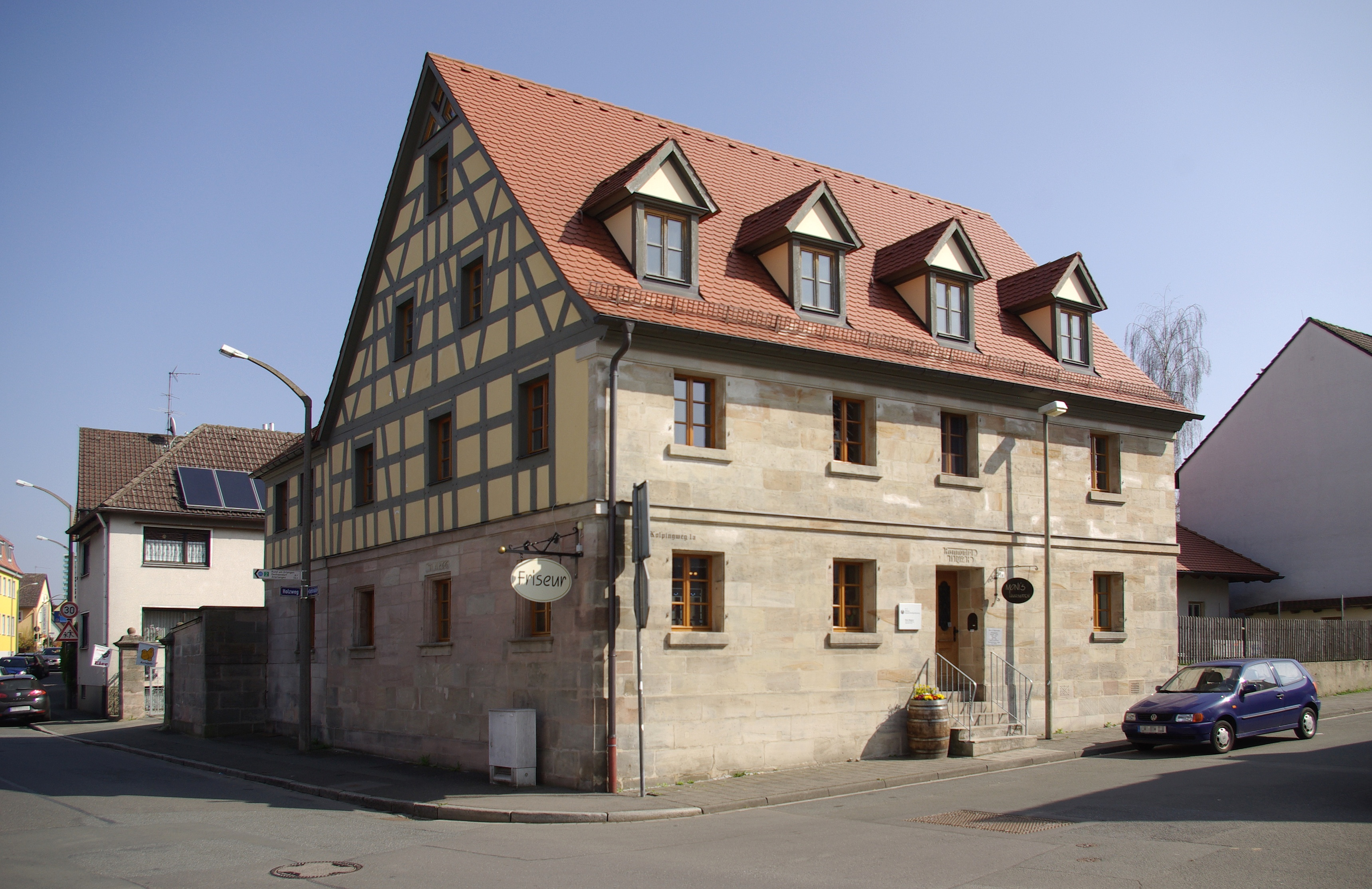 Facherk- und Sandsteinhaus im Kolpingweg 1a im Erlanger Stadtteil Büchenbach. Elternhaus des bayerischen Landtagsabgeordneten und Zinnfolienfabrikanten David Morgenstern (1814-1882).